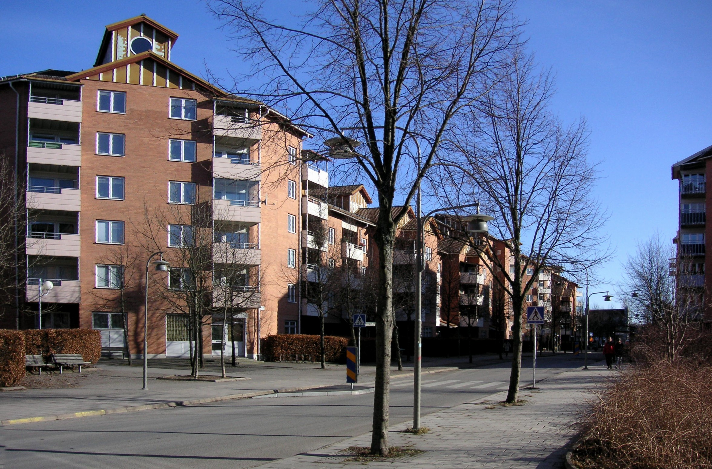 Skarpnäcks Allé i Stockholm